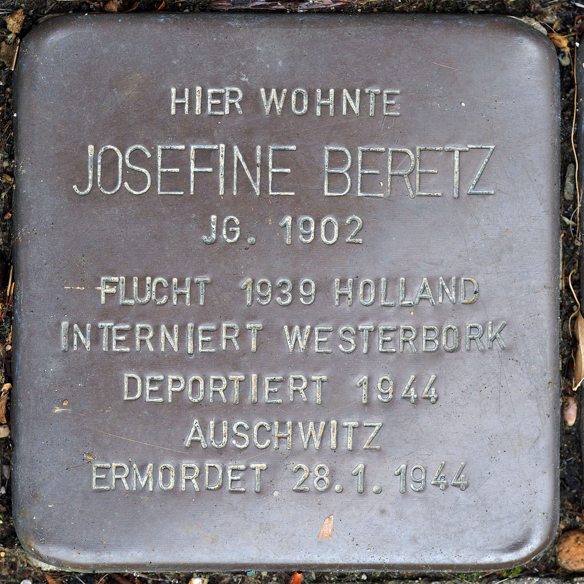 Stolpersteine GV: Beretz Josefine